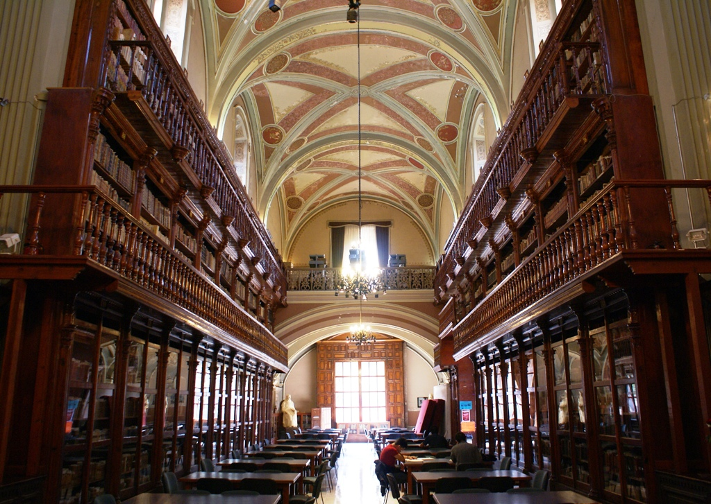 Biblioteca Pública de la Universidad Michoacana ubicada en Av. Madero Poniente esquina con Nigromante, Centro Histórico de Morelia, Michoacán, México. Fundada en 1930, conserva un fondo bibliográfico antiguo de 22,901 volúmenes, que van desde el siglo XV hasta principios del siglo XX. El edificio donde tiene su sede la biblioteca fue un templo de los Jesuitas durante la época del Virreinato de la Nueva España, construido en el siglo XVII en estilo barroco. En sui interior la biblioteca conserva murales al fresco pintado a mediados del siglo XX por los artistas estadounidenses Hollis Howard Holbrook, S. C. Schoneberg y R. Hansen así como del mexicano Antonio Silva Díaz.